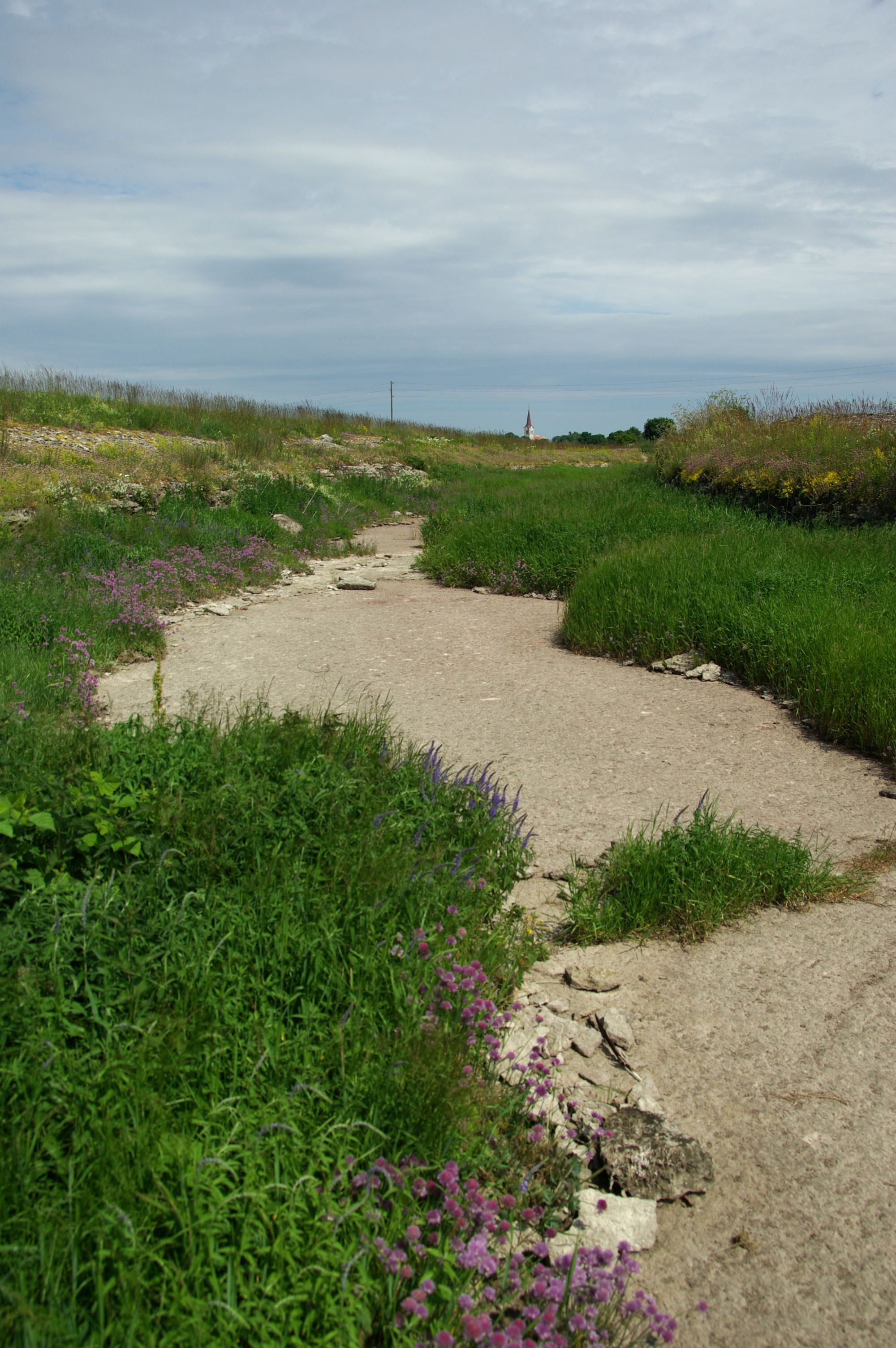 See osa jõest asub Korstivere karsti alal.1 km enne Kostivere keskust käändub jõgi kirdesse ja kaob umbes 1,5 km hiljem (6,3 km kaugusel suudmest, Kostivere karstialal) maa alla. Maa all voolab jõgi üle 2,5 km ja sealne vooluteestik on kohati kuni 0,5 km lai. Maapinnale tõuseb jõgi paljude allikatena Jõelähtme külas, maanteesillast mõnikümmend meetrit alamal. Jõe suue asub Jägala-Joa külas, 100 m allpool Jägala juga.